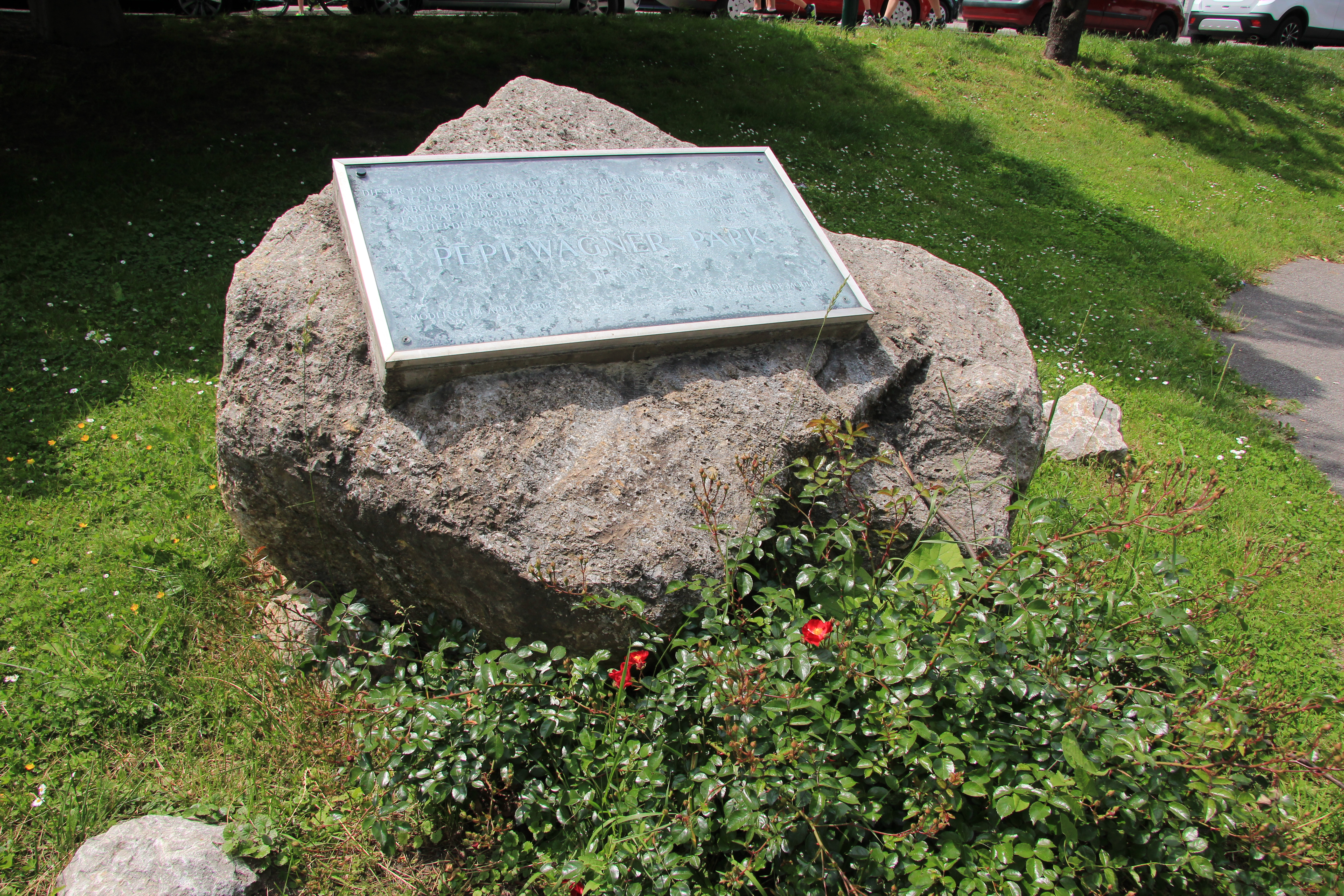 Gedenkstein für Pepiwagner im Wagnerpark beim Bahnhof Mödling